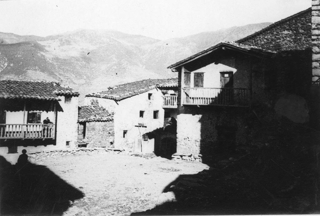 Algunes cases de Toloriu, una amb gent al balcó. Cèsar August Torras i Ferreri (Entre 1890 i 1923)